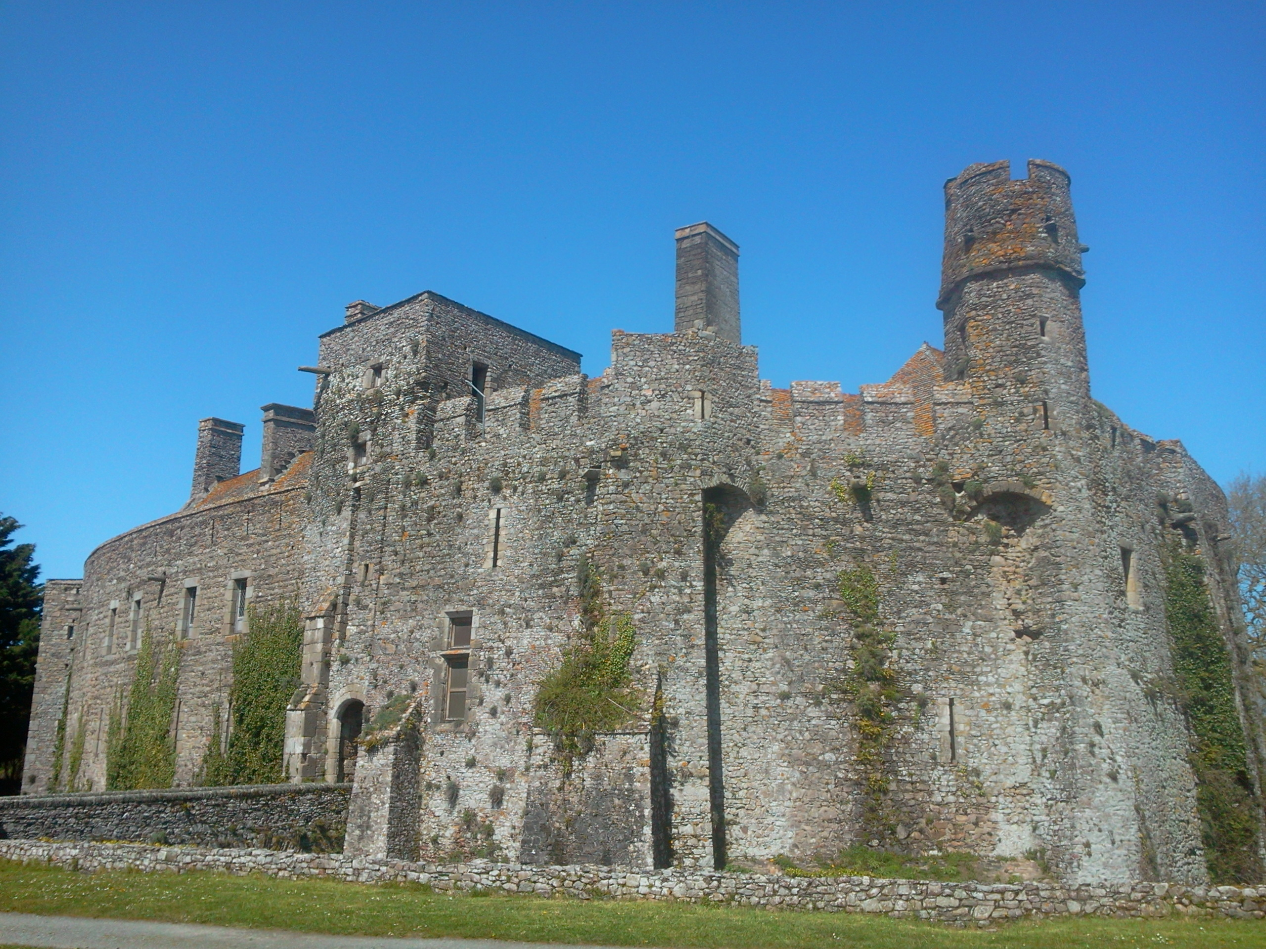 Vue générale extérieure du château de Pirou avec en particulier les tours rondes et carrées